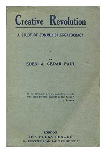 Eden Paul Cedar Paul: Creative revolution, a study of communist ergatocracy. London : The Plebs' League, 1920